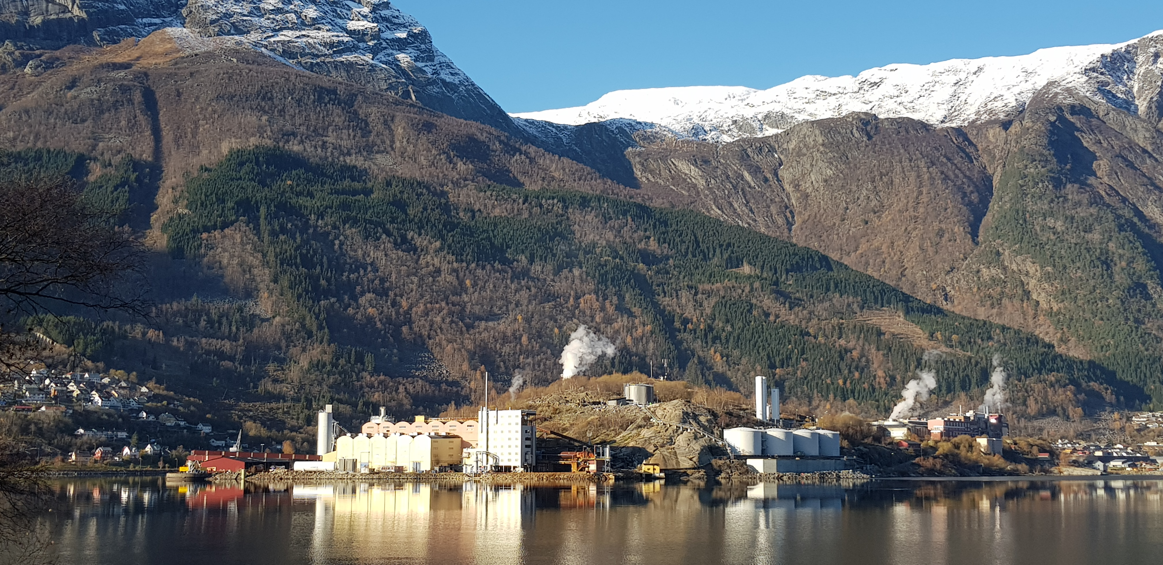 Noralf AS med Boliden Odda AS i bakgrunnene.